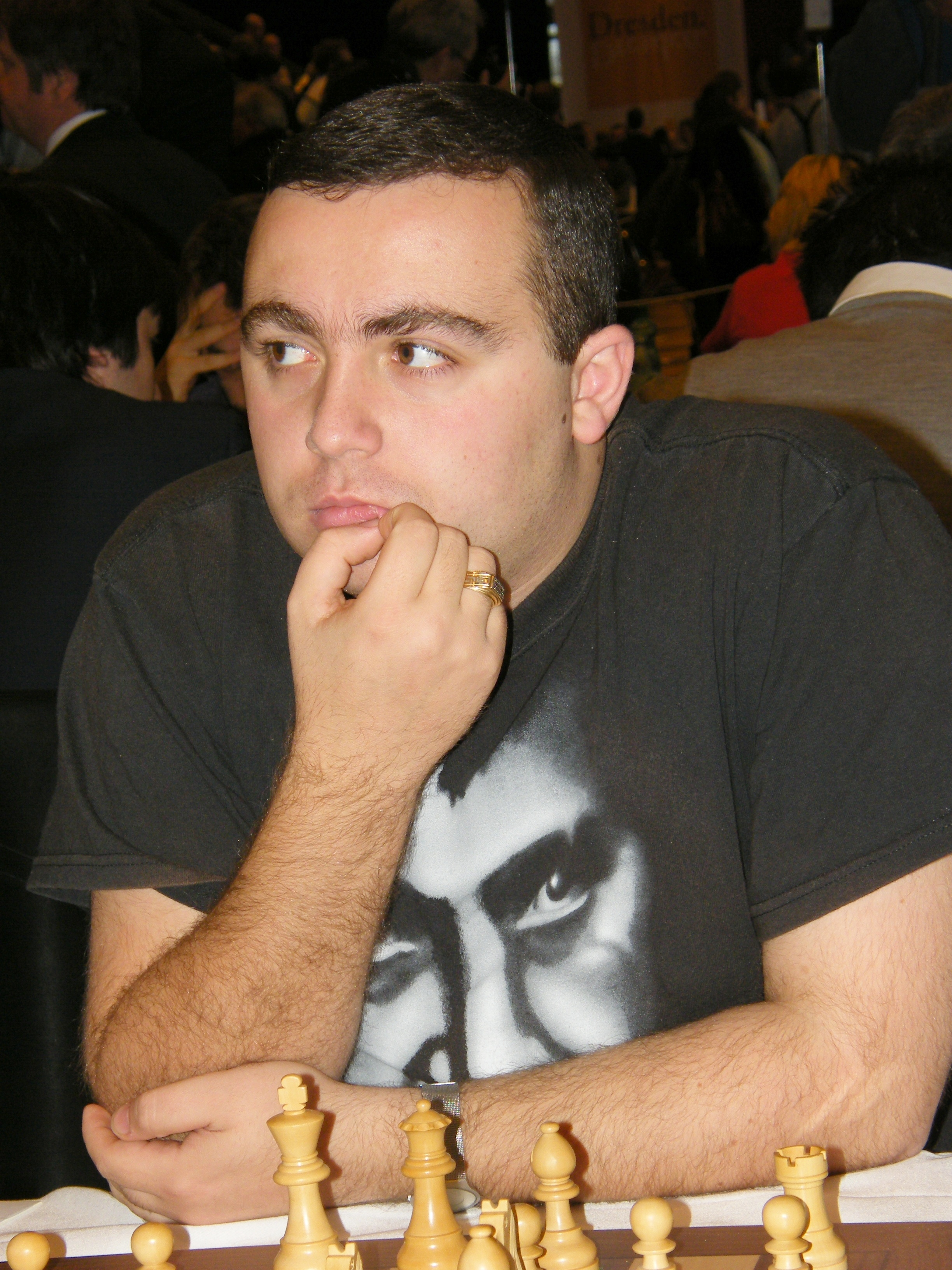 Tigran L. Petrosjan bei der 38. Schacholympiade in Dresden 2008